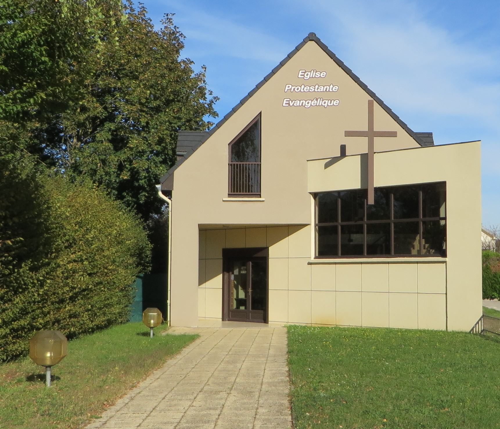 Mondelange Eglise Protestante Evangélique